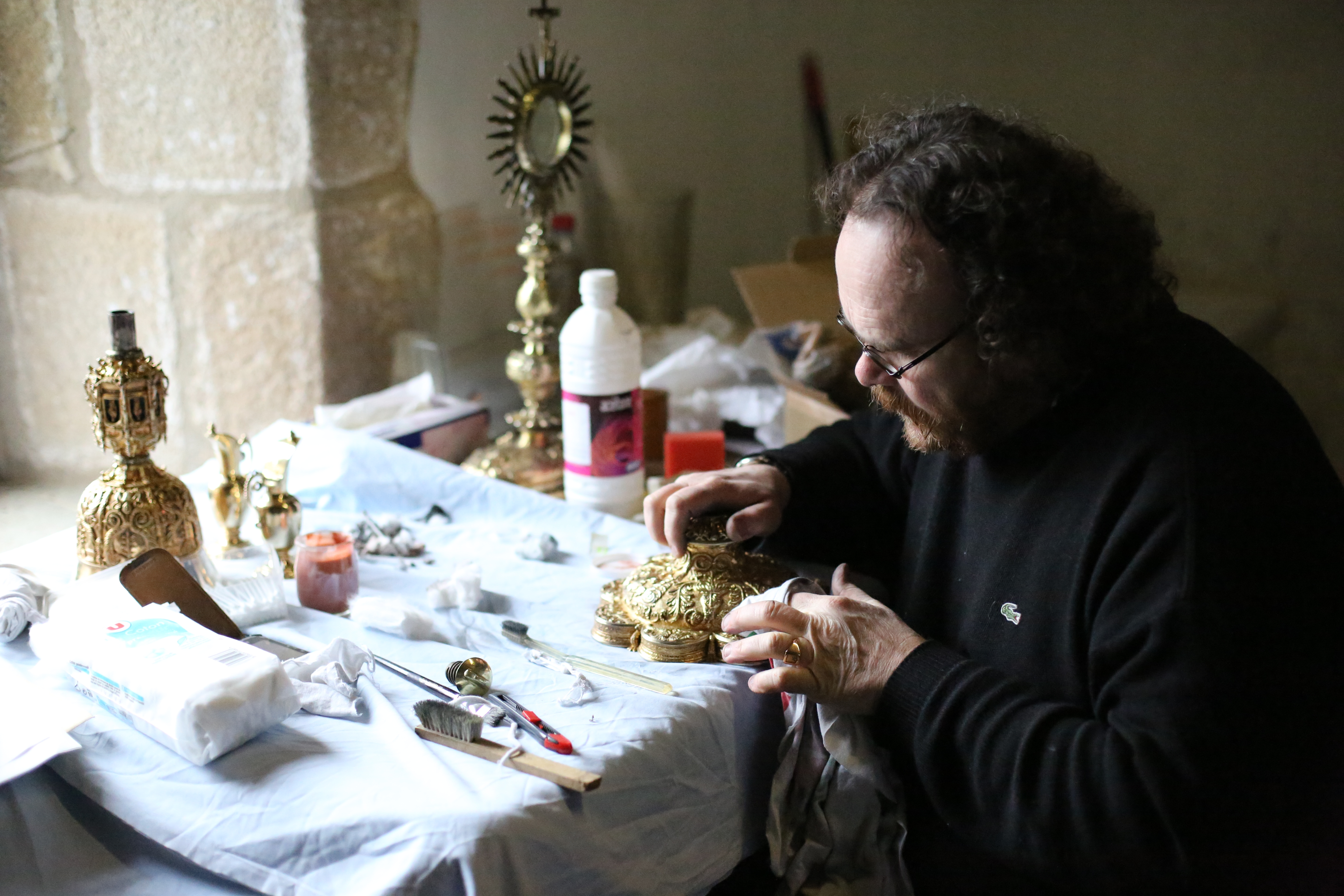 Christophe Evellin nettoyant le calice de Guillaume Floch, pièce majeure du trésor de Saint-Jean-du-Doigt